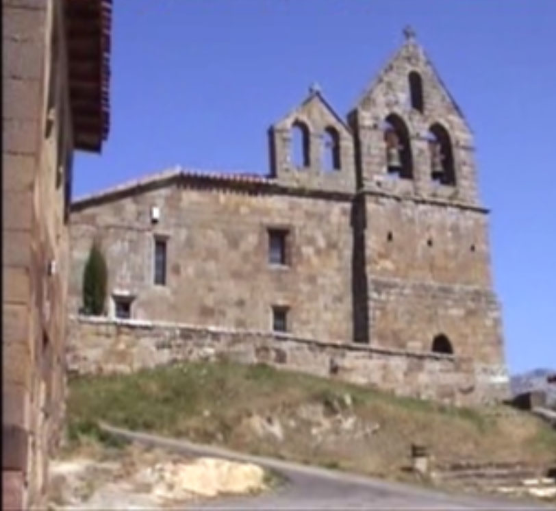 Iglesia de Santa Marina, Allén del Hoyo (Valderredible)